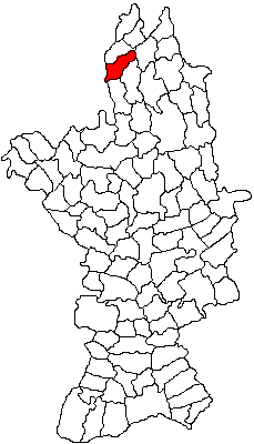 Volapük: Topam in ziläk: Olt.